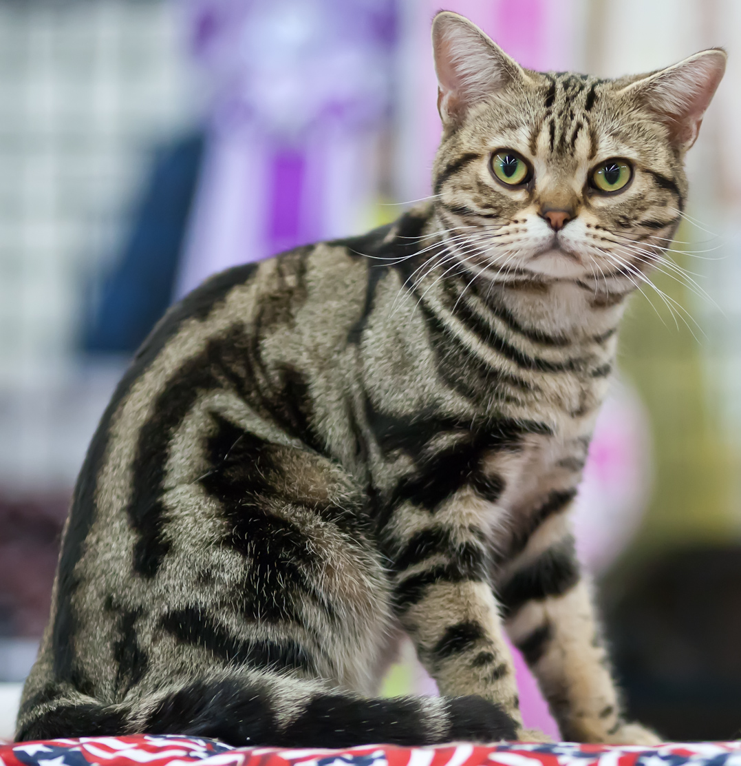 GC Yatfung's Brown Cobra!!! [AMS] American shorhtair présenté en exposition féline d'Helsinki en 2013.